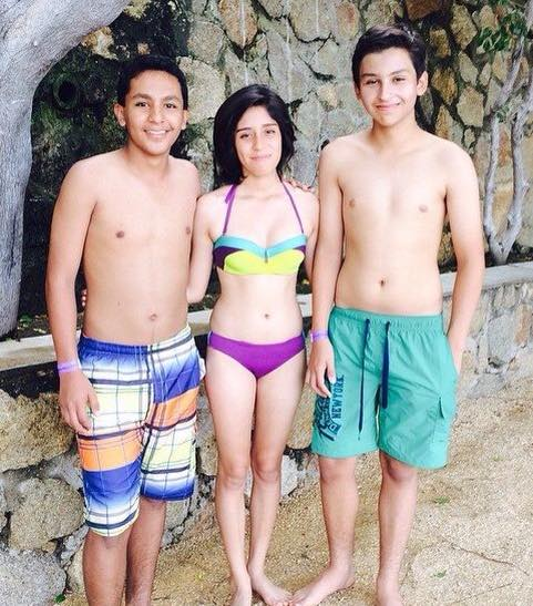 3 personas en traje de baño en Acapulco.